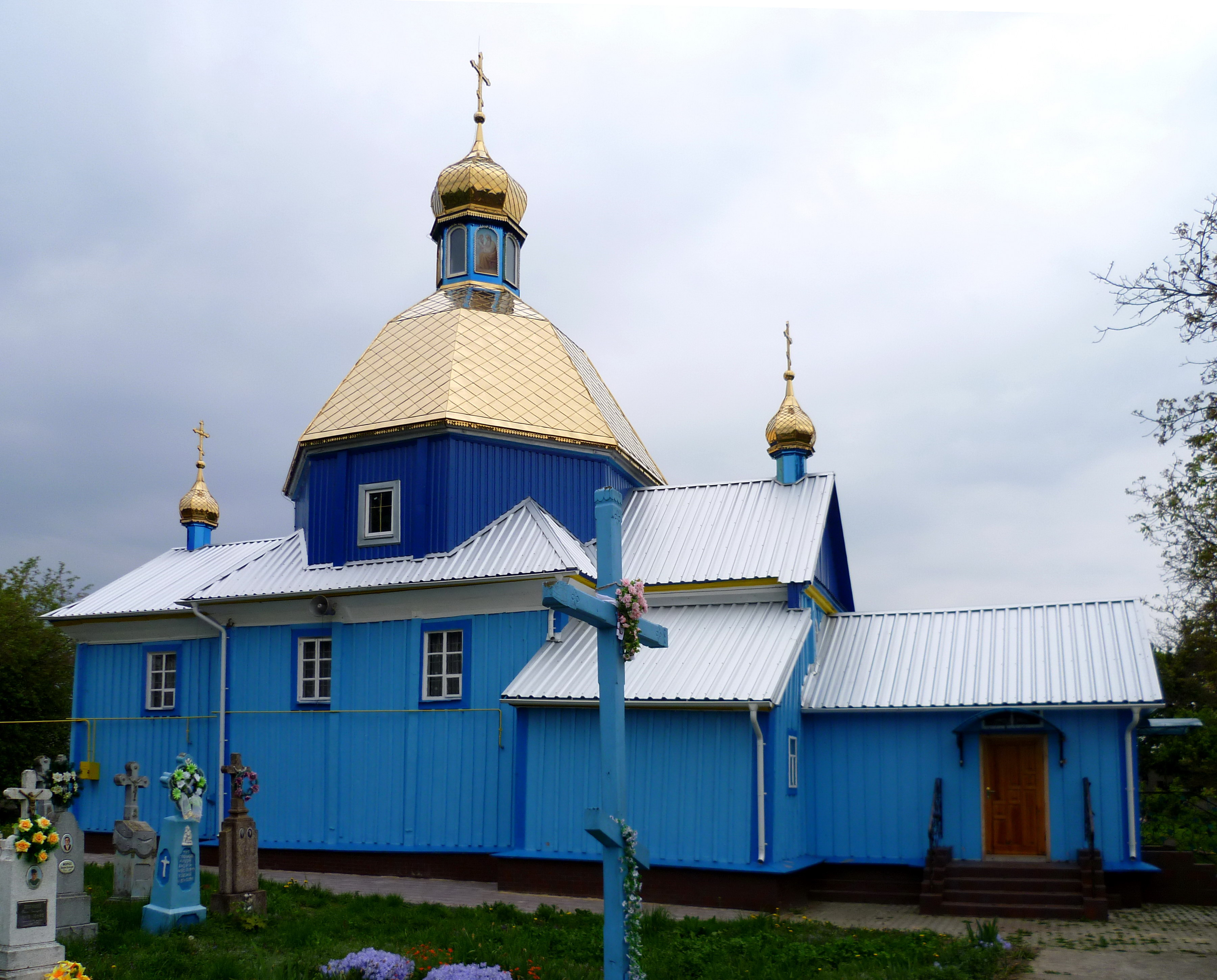 Аннозачатіївська церква (XVII ст.) - вигляд з півночі - в с.Підбереззя Горохівського району Волинської області України